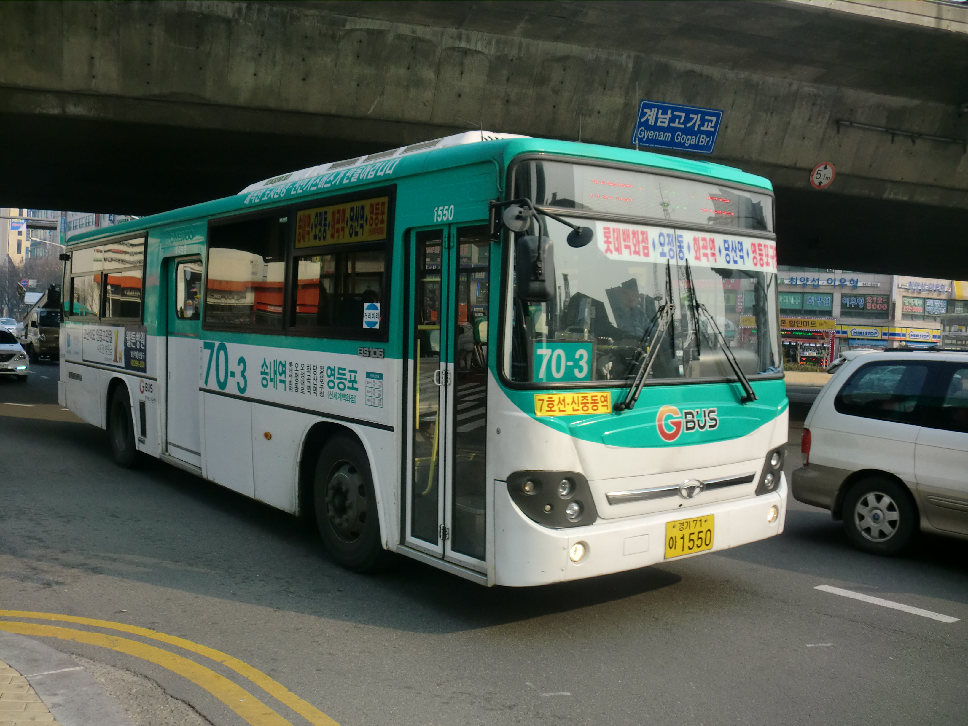 부천시내버스 70-3번(부천시 원미구에서 촬영)